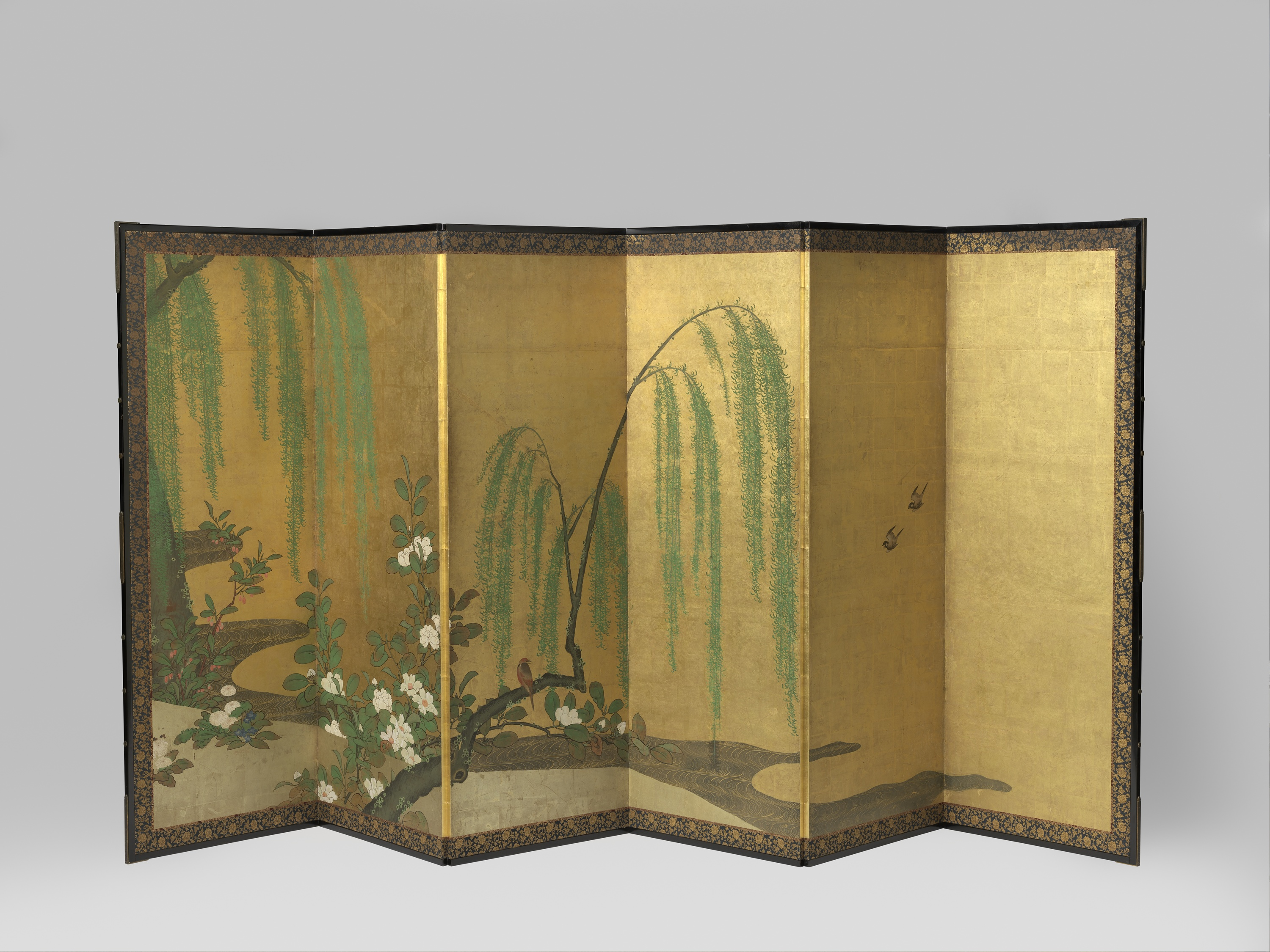 Zesbladig kamerscherm met een lentevoorstelling van gestileerd water, camelia, wilgen en twee vogels, tegen een achtergrond van bladgoud. Label Line: Unkoku-school, Japan, ca. 1630–1660, inkt, papier, bladgoud, hout